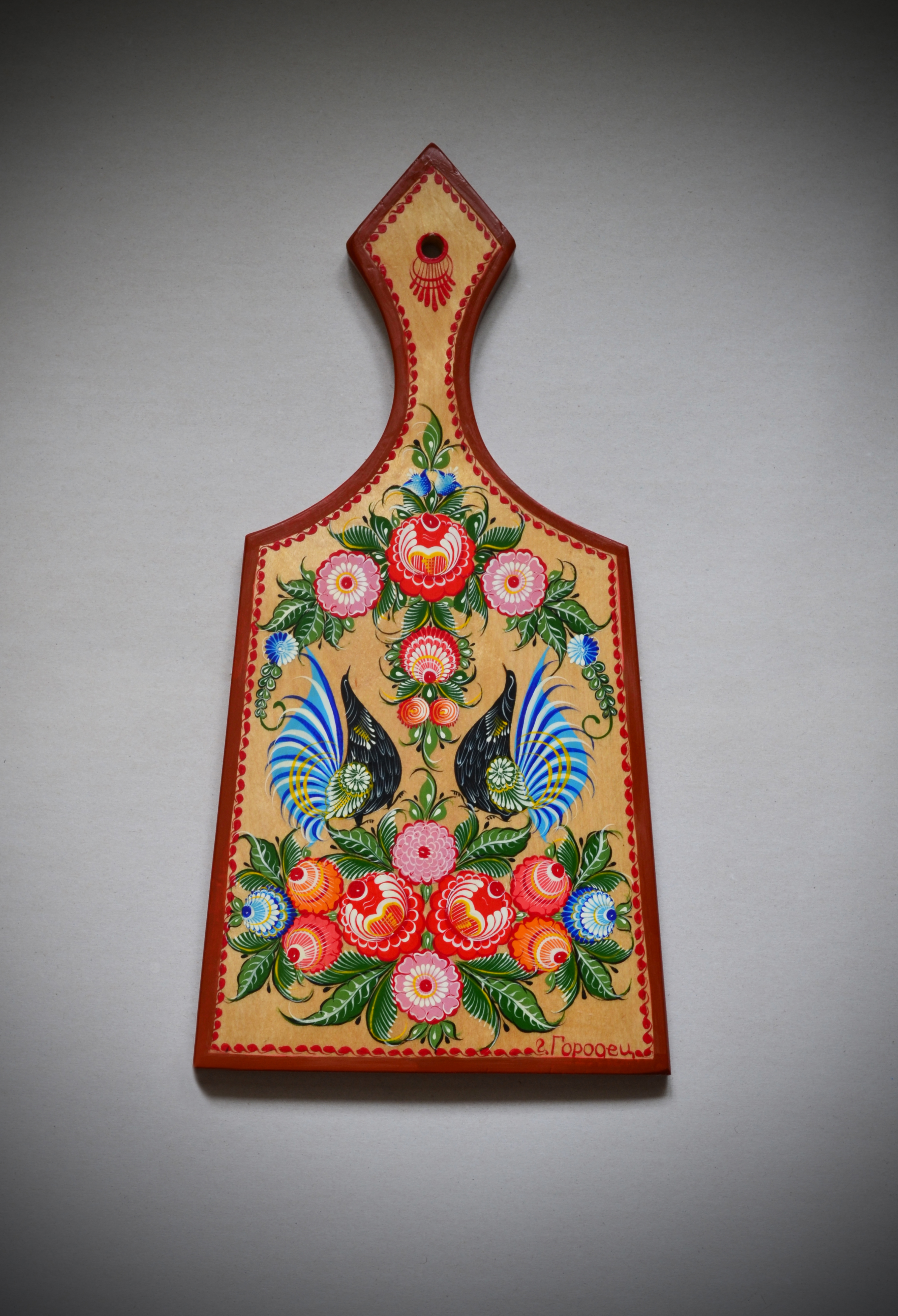 Городецкая роспись.Россия,Нижегородская область,Городец.